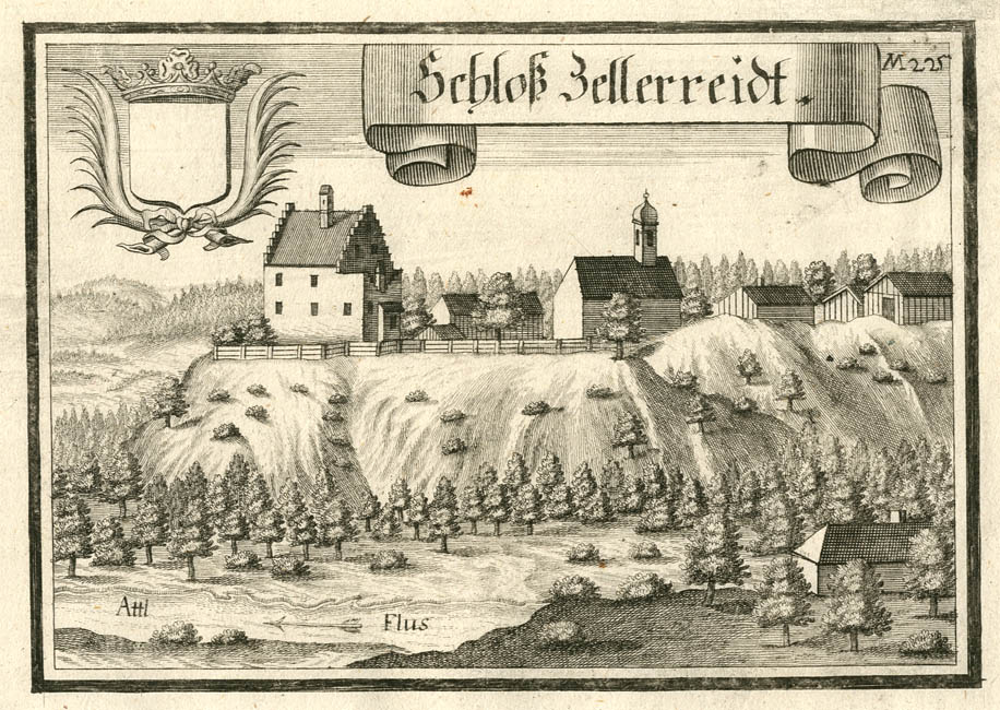 “Schloß Zellerreidt” (Zellerreit, Ramerberg), aus : Beschreibung des Churfürsten- u. Hertzogthumbs Ober- und Nidern Bayrn. Rentamt München, 2. Auflage um 1750 (1. Auflage erschien 1701)